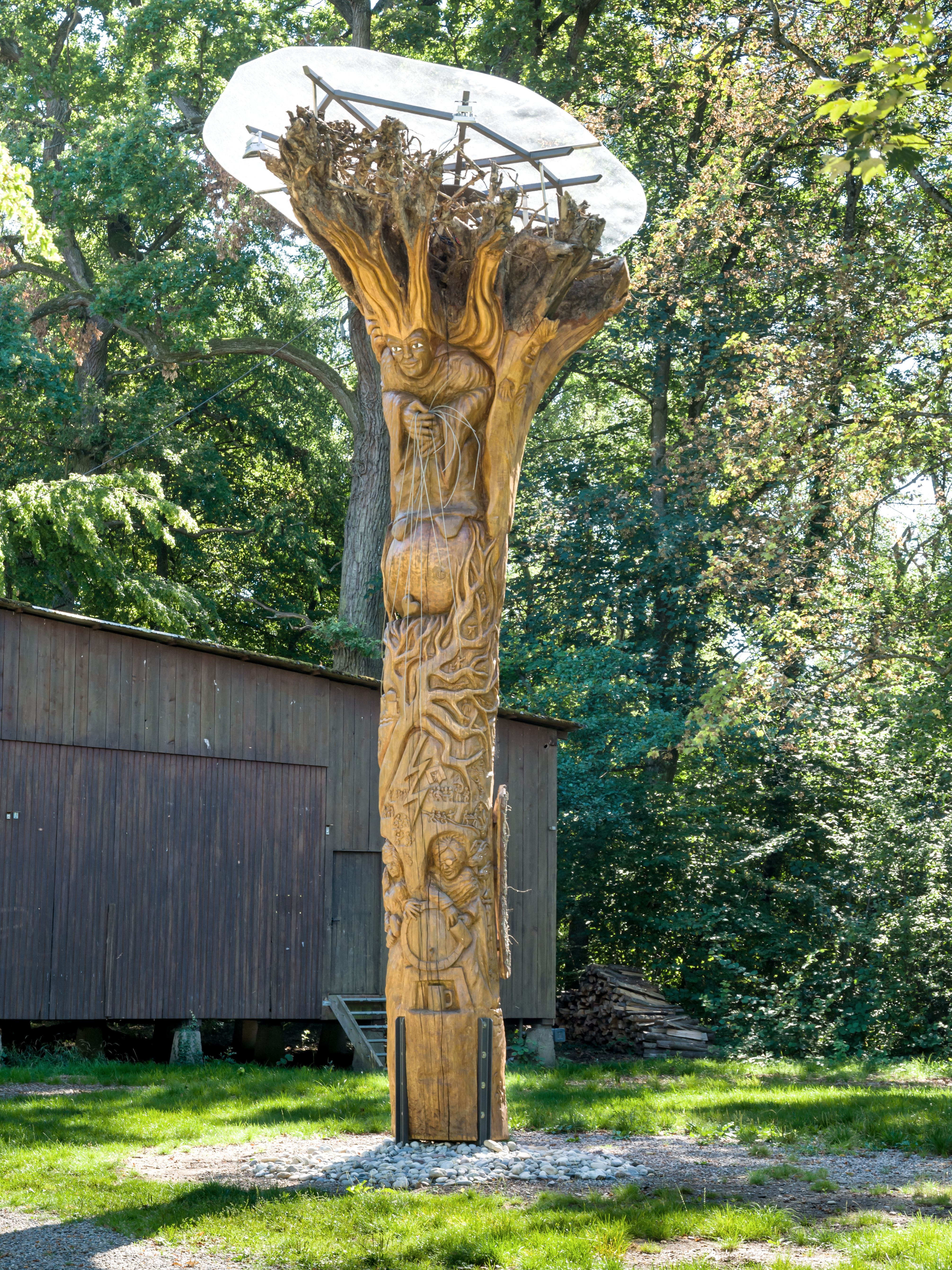 Die Holzskulptur "Weltenlenker" von THomas Rees Auf dem Hochdorfer Waldhockplatz. DIe Skulptur wurde geschnitzt aus einer ebenfalls 200 Jahre alten entwurzelten Mooswald Eiche, da die Eiche die 3 Tage nach dem Waldhock 2014 auf dem Festplatzu umgestürzt war,.nicht mehr verwertbar war. Das Kunstwerk wurde vor Ort und nicht in seiner Werkstadt geschaffen